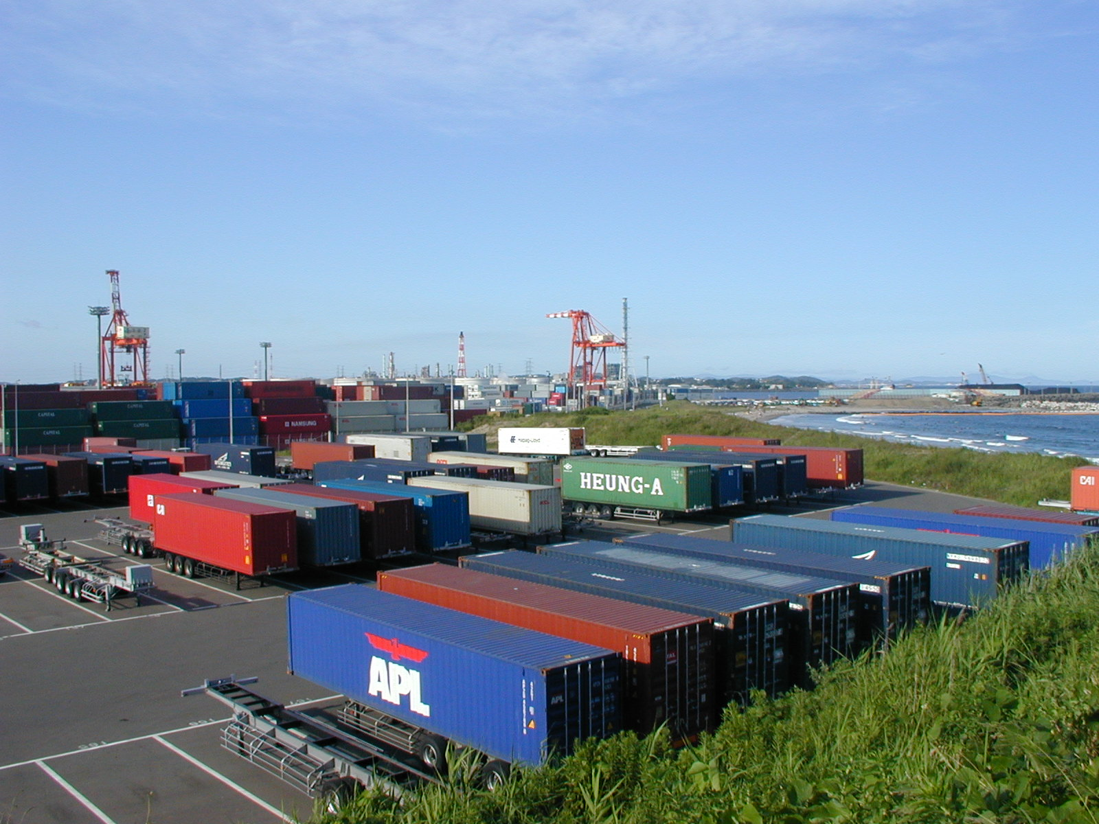 仙台港の高砂コンテナターミナルと向洋埠頭南側の仙台港サーフスポット